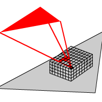 Eine Illustration des Hemi-Cube-Verfahrens zur Approximation der Formfaktoren für Radiosity.